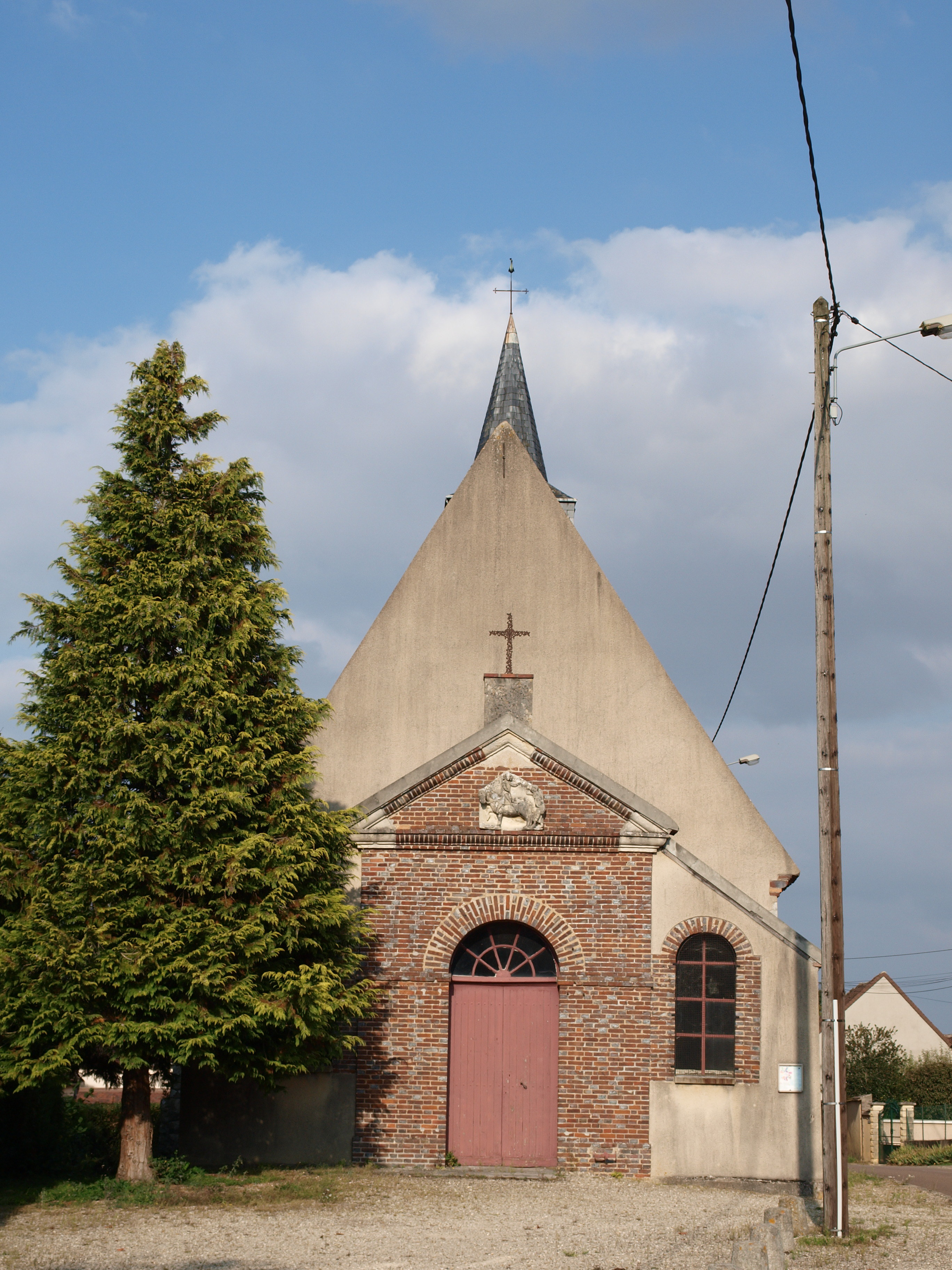 Theil-sur-Vanne (Yonne, France) ; église